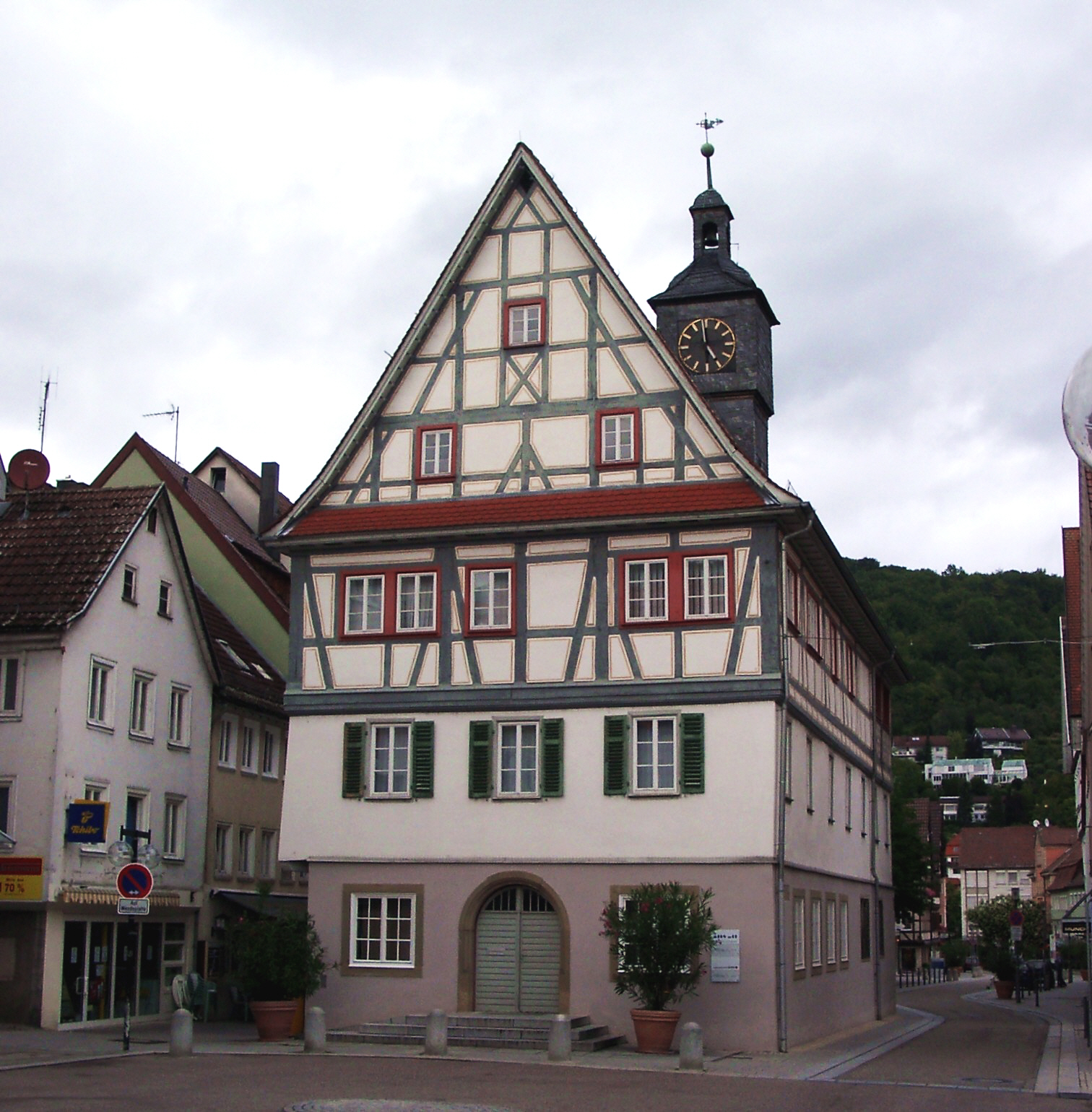 Künzelsau, Altes Rathaus